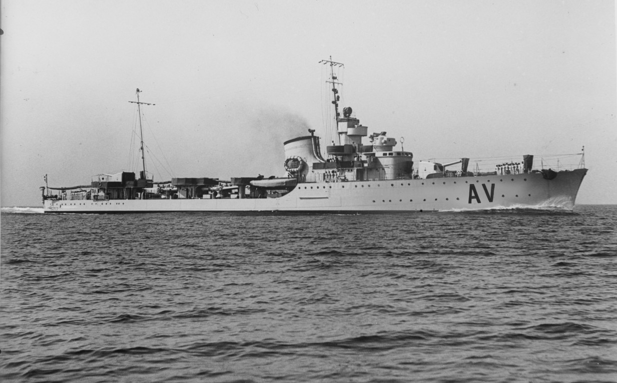 Veduta del acciatorpediniere Alfredo Oriani, sec. XX inizio (AS Livorno, Archivio storico del Cantiere navale Luigi Orlando di Livorno)